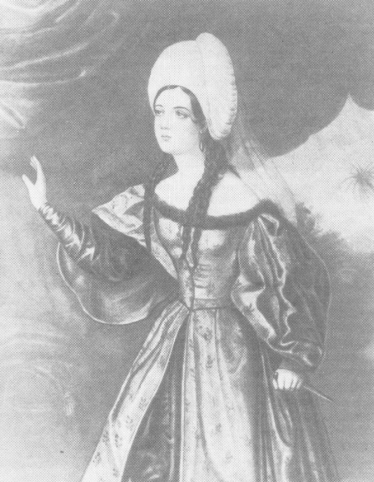 А. Д. Абамелек в костюме Заремы. Портрет неизвестного художника. 1831 г. Местонахождение неизвестно.